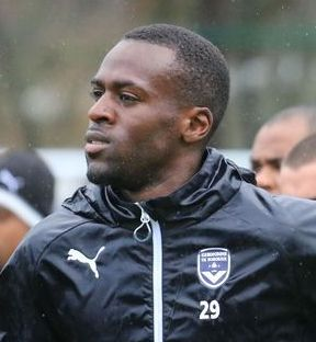 Maxime Poundjé à l'entraînement avec les Girondins de Bordeaux.